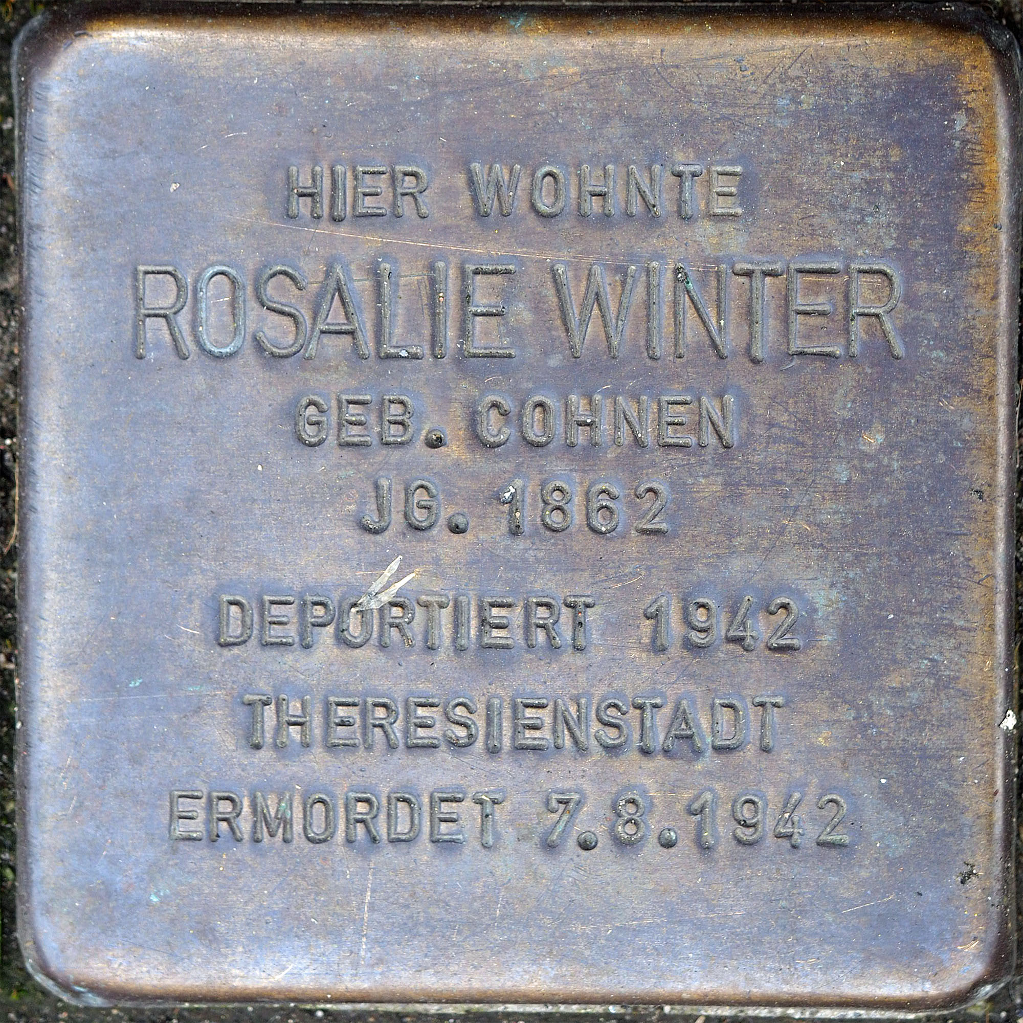 Stolpersteine Korschenbroich: Winter, Rosalie